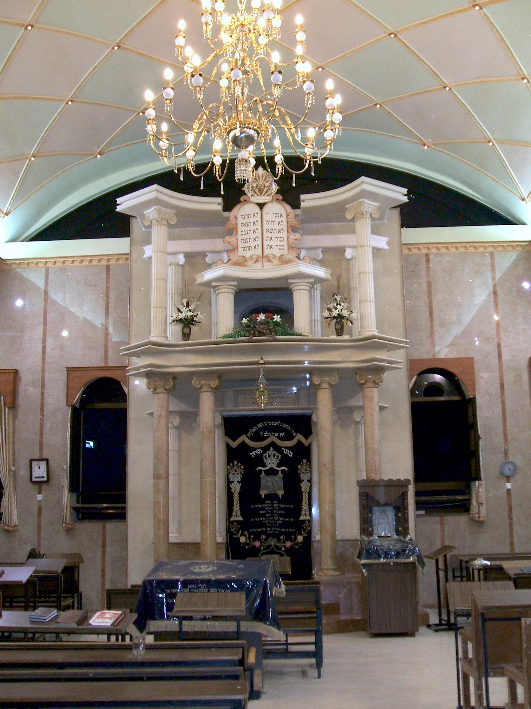 Beis medrash Toiroh VeYiroh of Neturei Karta, Jerusalem. Saturday night, 12 August 2007. By me: Eidah 21:40, 13 August 2007 (UTC)